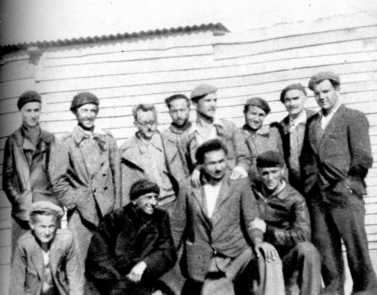 Francuski logor San Siprijen. Grupa praških studenata: Slavko Čolić, Ahmet Fetahagić, Ratko Pavlović-Čičko, Ivan Jakšić, Ivo Vejvo-da, Petar Drapšin, Elijas Engl, Laza Udovički, Ivo Rukavina, Mirko Horvat, Laza Latinović i Mirko Kovačević.